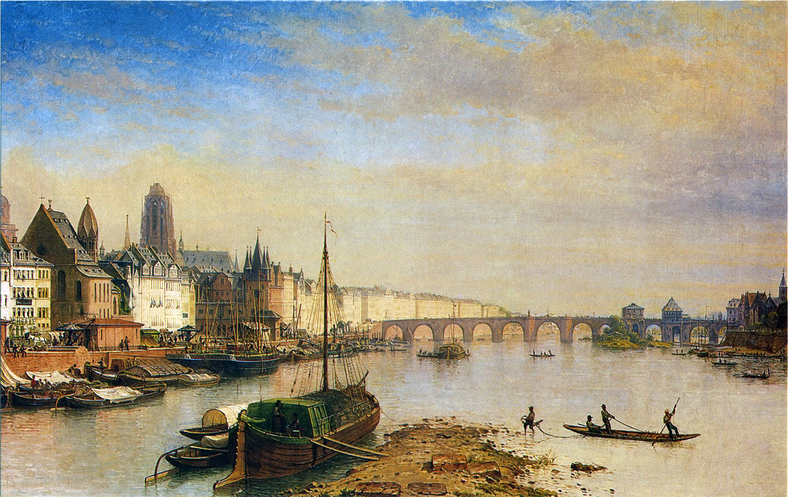 Schiffe und auch kleinere Boote am Mainkai, dem alten Hafen der Handelsstadt Frankfurt, Boote auch am gegenüberliegenden flachen Ufer südwestlich der Alten Brücke, ein Flussschiff ankert an einer Sandbank flussaufwärts der Insel Mainlust.